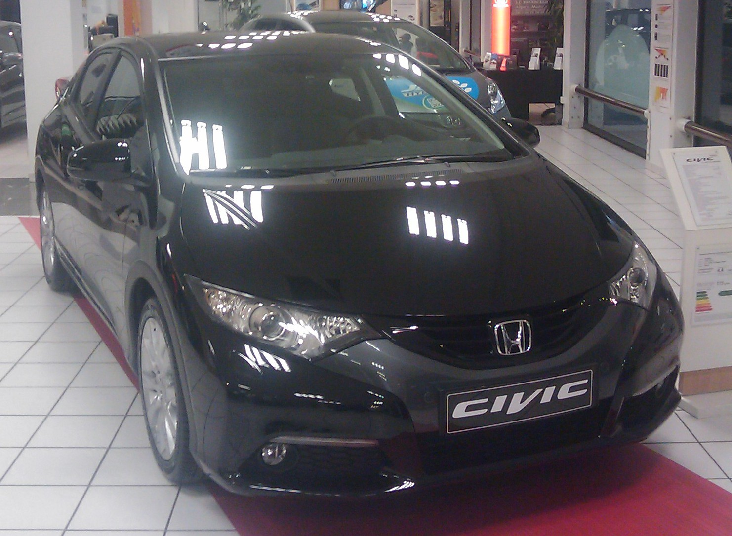 Honda Civic 2012 (9ème génération) en exposition en concession